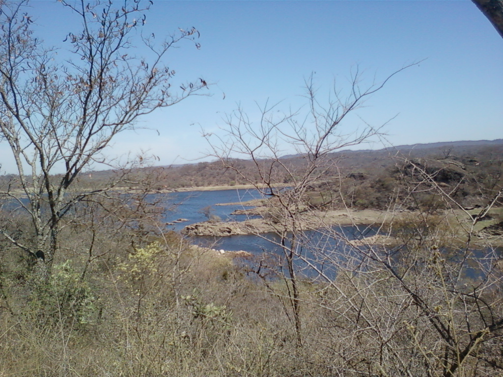 Imágen del ingreso al Dique de Collagasta, a 9 km de la Villa de El Alto...